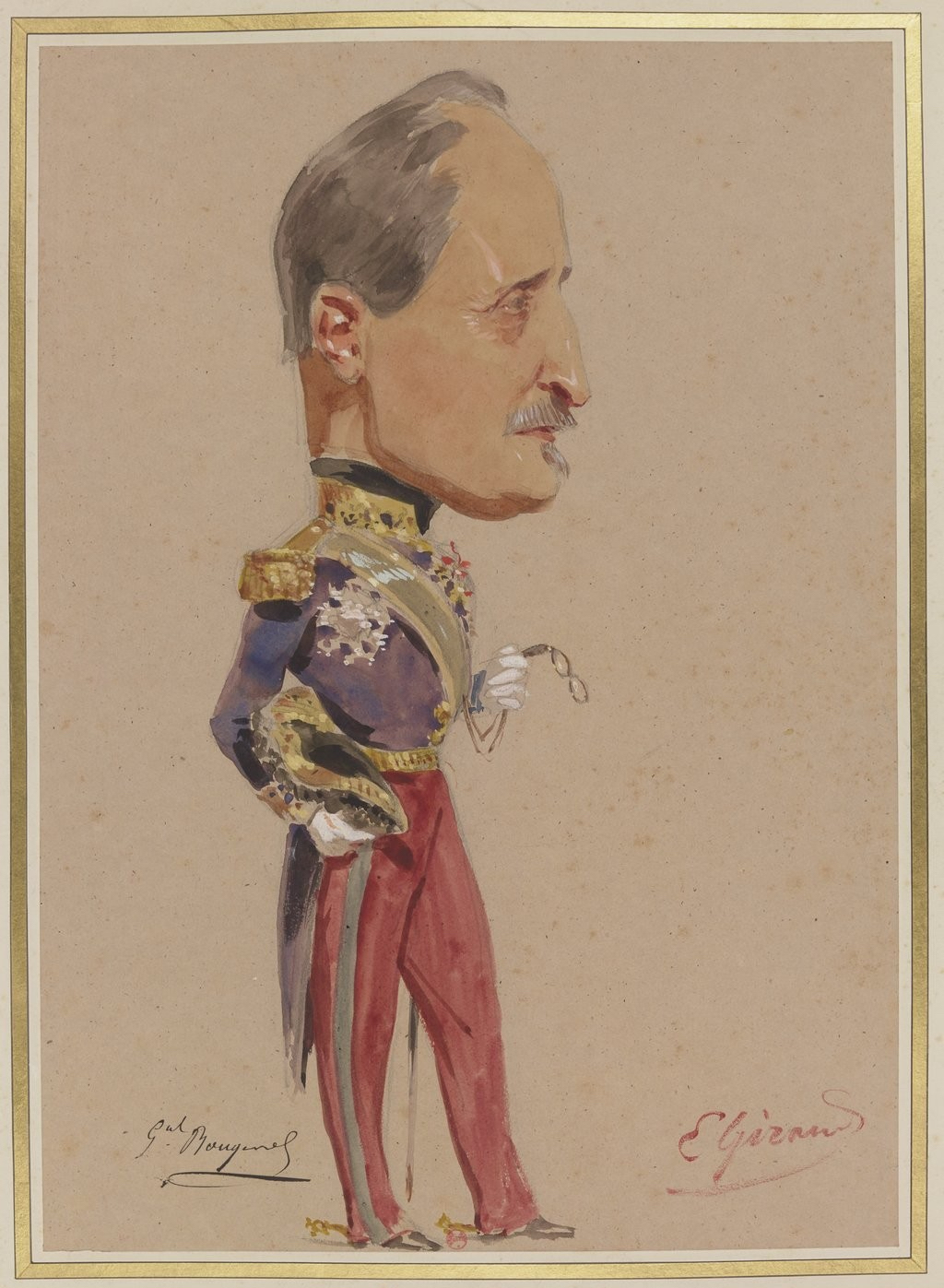 (Les Soirées du Louvre). (22), général Jean-François Bougenel